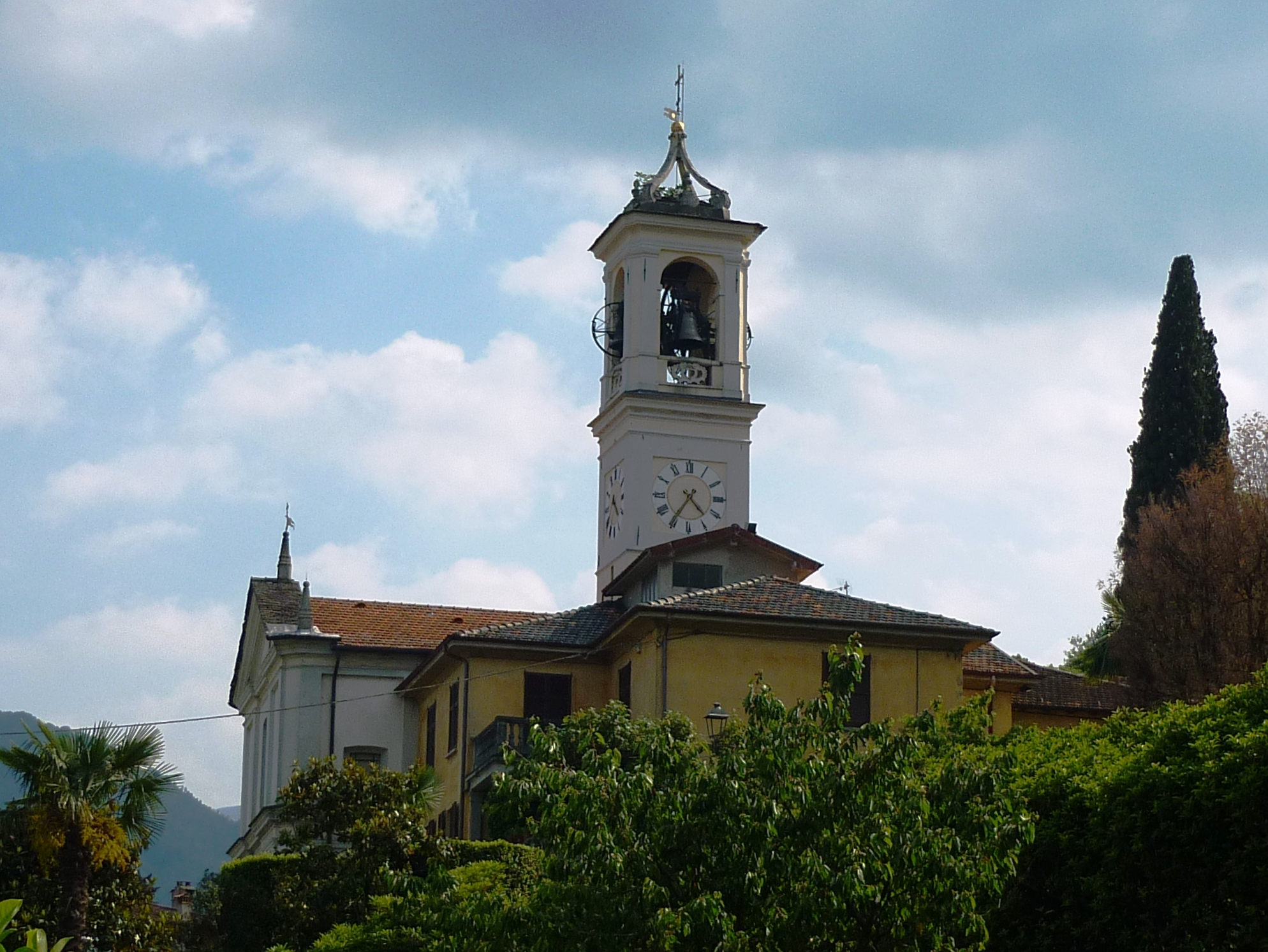 Pfarrkirche Cadenabbia di Griante, Griante, Comersee, Italien